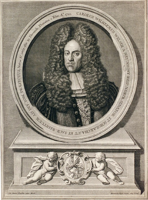 Carl Wilhelm Welser von Neunhof (1663-1711) - copper engraving